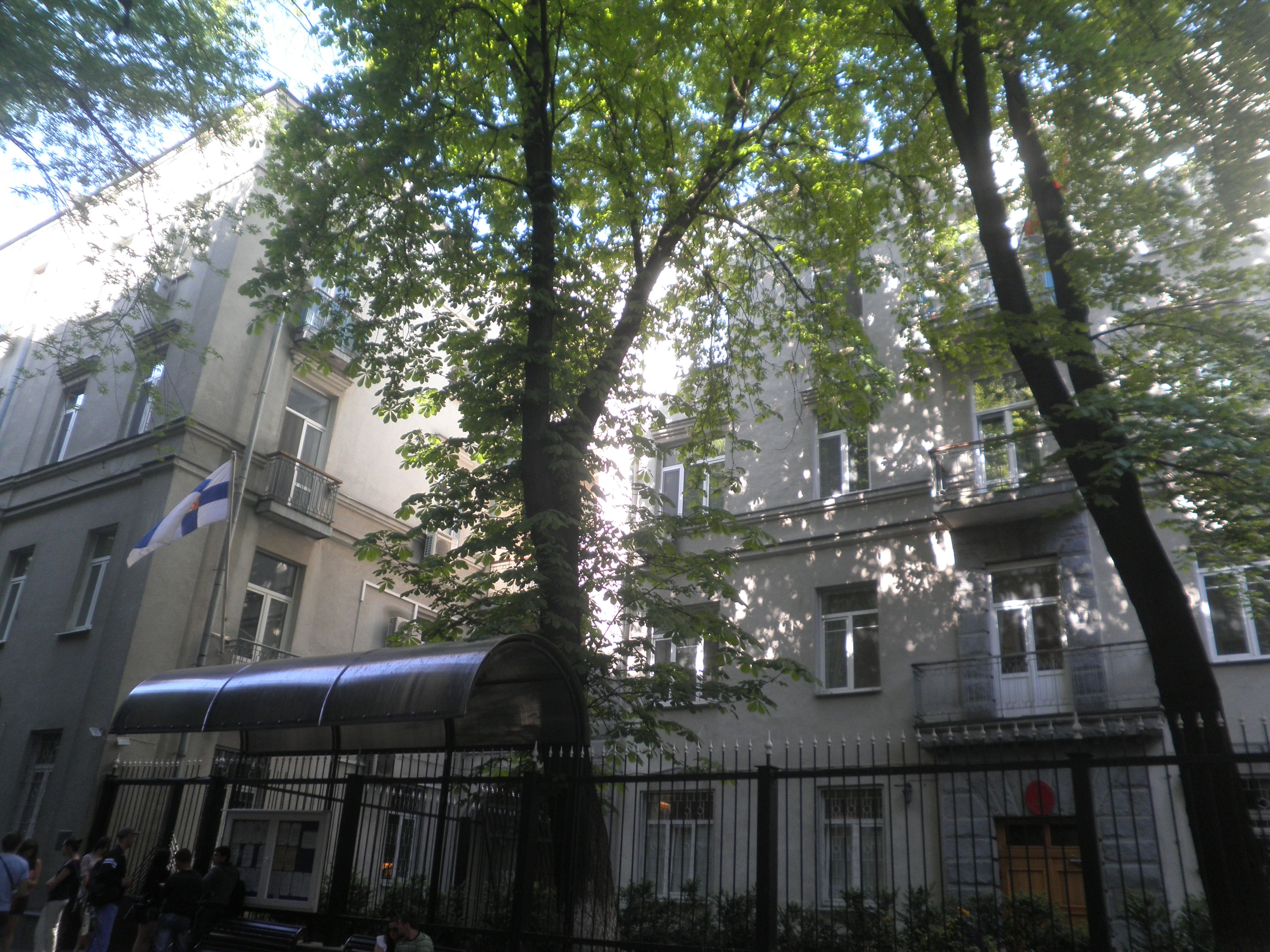 Посольство Фінляндії в Києві